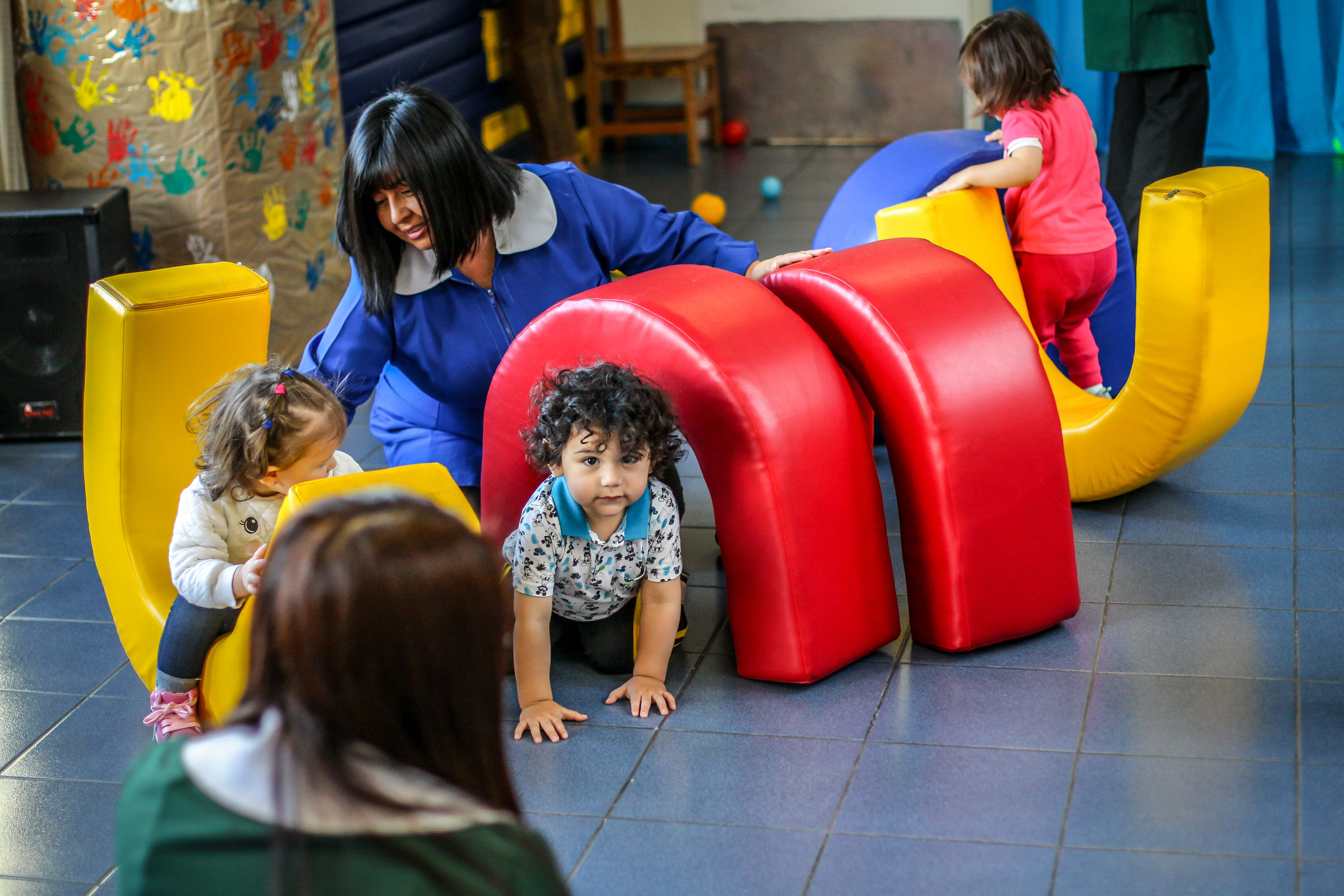 4 de Mayo 2018/PUNTA ARENAS. Intendente (s) Nicolás Cogler participa de la presentación del convenio de inclusión educativa en la primera infancia, la actividad fue realizada en el jardín infantil Las Charitas. FOTO: JOEL ESTAY/INTENDENCIA MAGALLANES